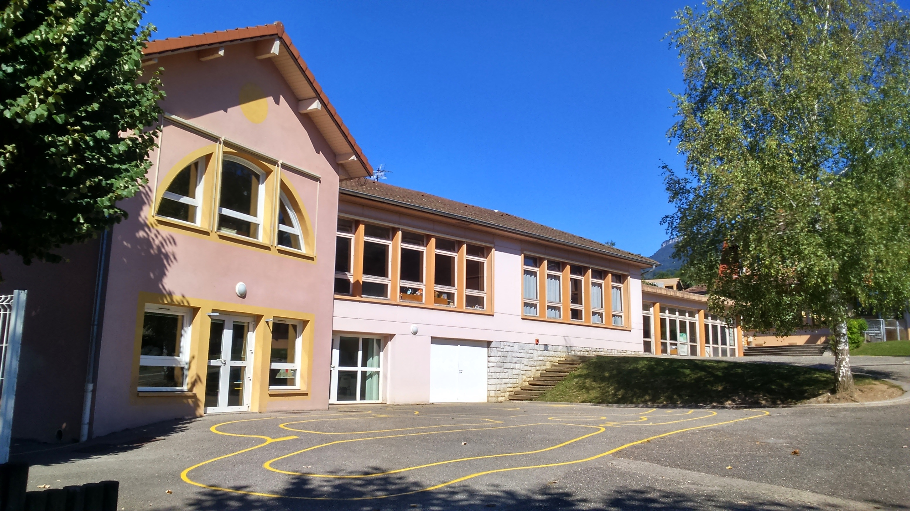 L'école primaire de Boncelin à Aix-les-Bains (73). Vue sur la partie maternelle de l'école.